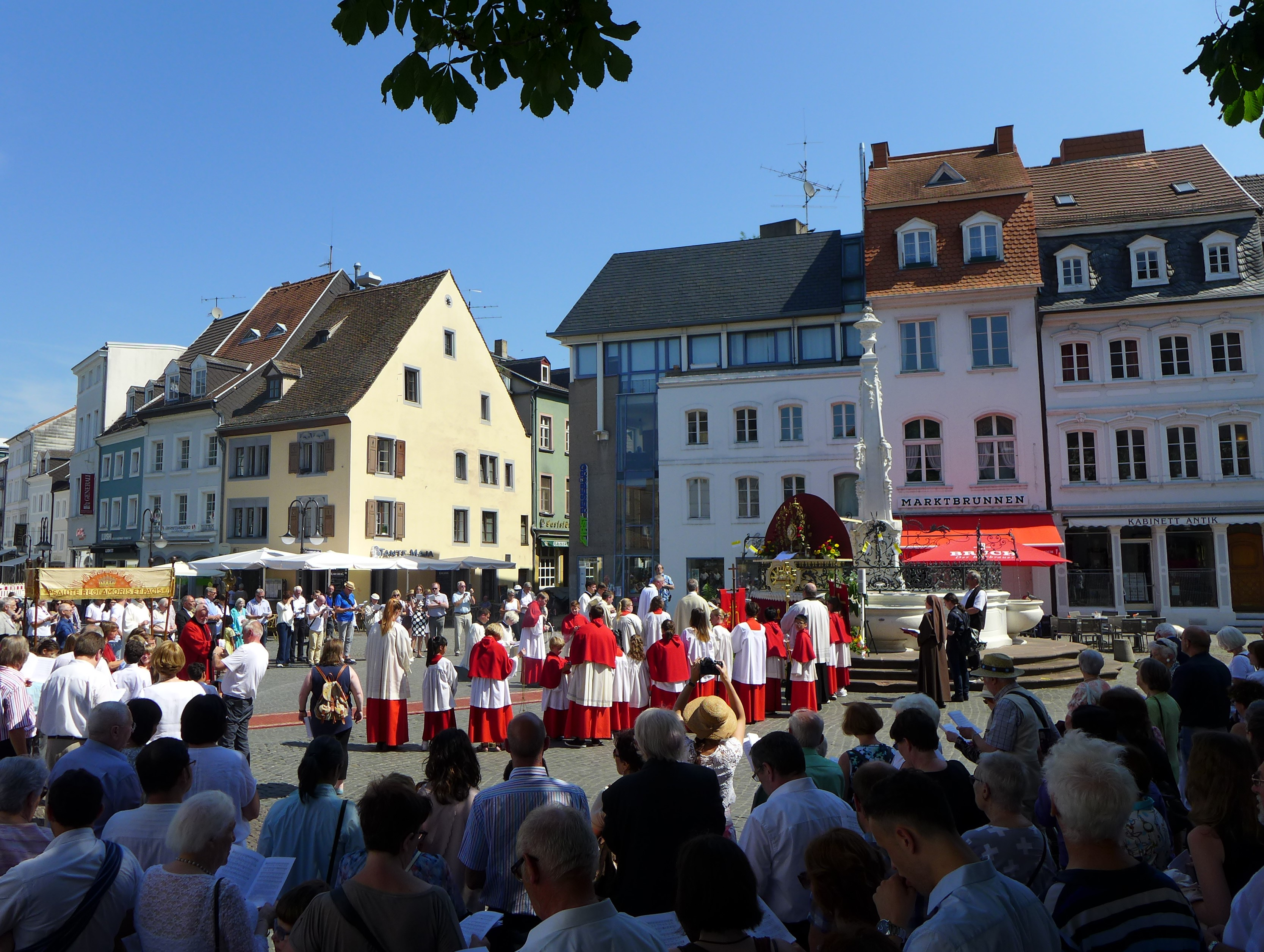 St. Johanner Markt (Saarbrücken), Fronleichnam 2017